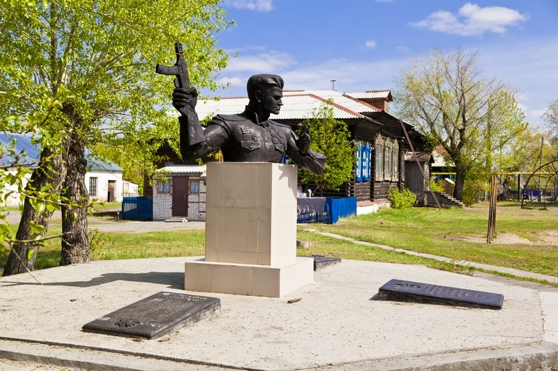 Kurgan.Pro